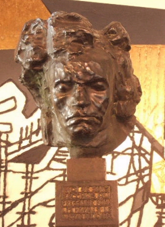 Émile-Antoine Bourdelle: Beethoven (um 1929) – Aufschrift im Sockel: Moi je suis Bacchus qui pressure pour les hommes le nectar delicieux